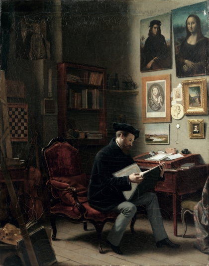 Autorretrato en su estudio, óleo sobre lienzo, 48 x 37,5 cm, Museo de Bellas Artes de Bilbao